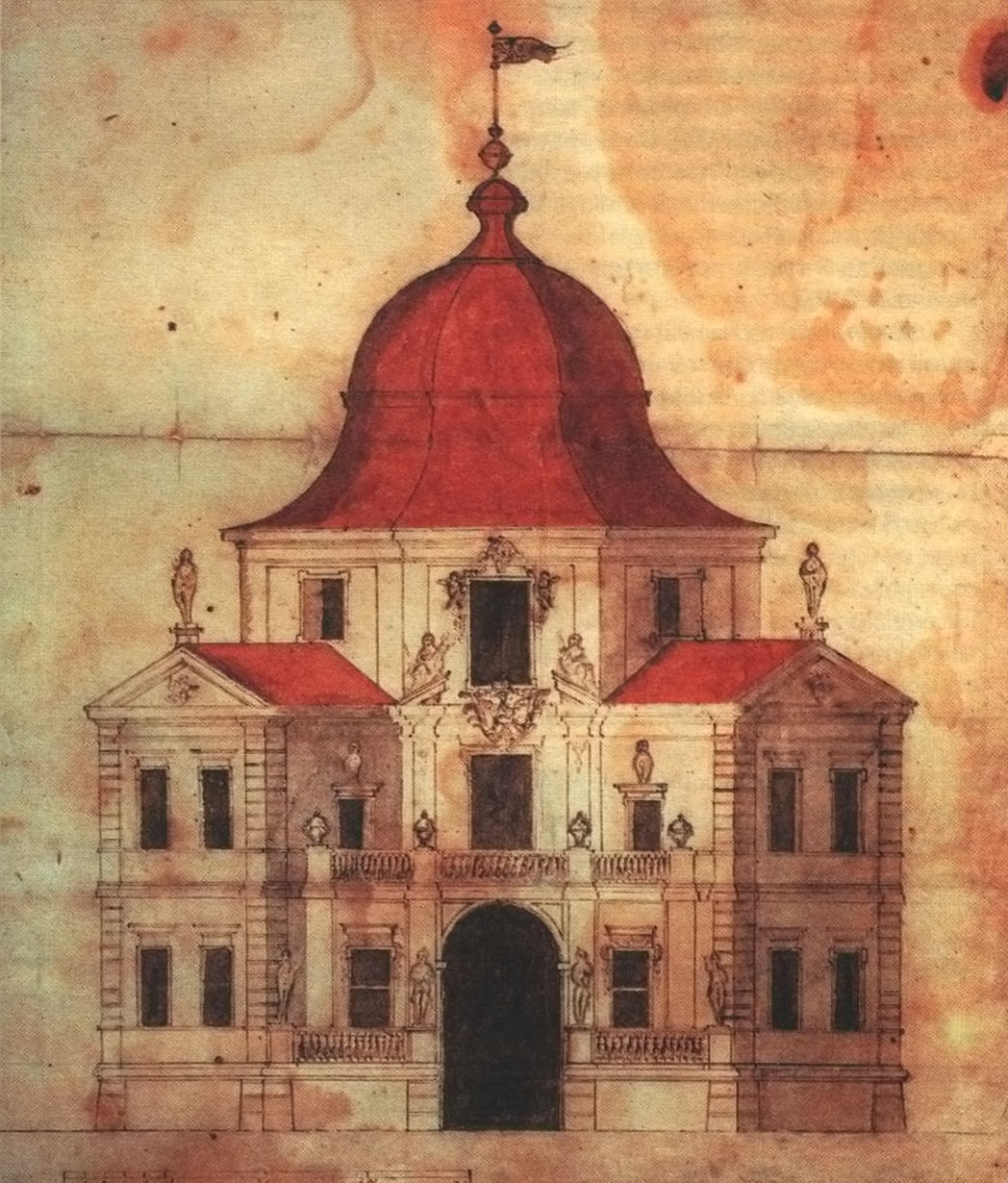 Беларуская (тарашкевіца): Чарнаўчыцы (Čarnaŭčycy), палац Радзівілаў (Radzivił). Праект